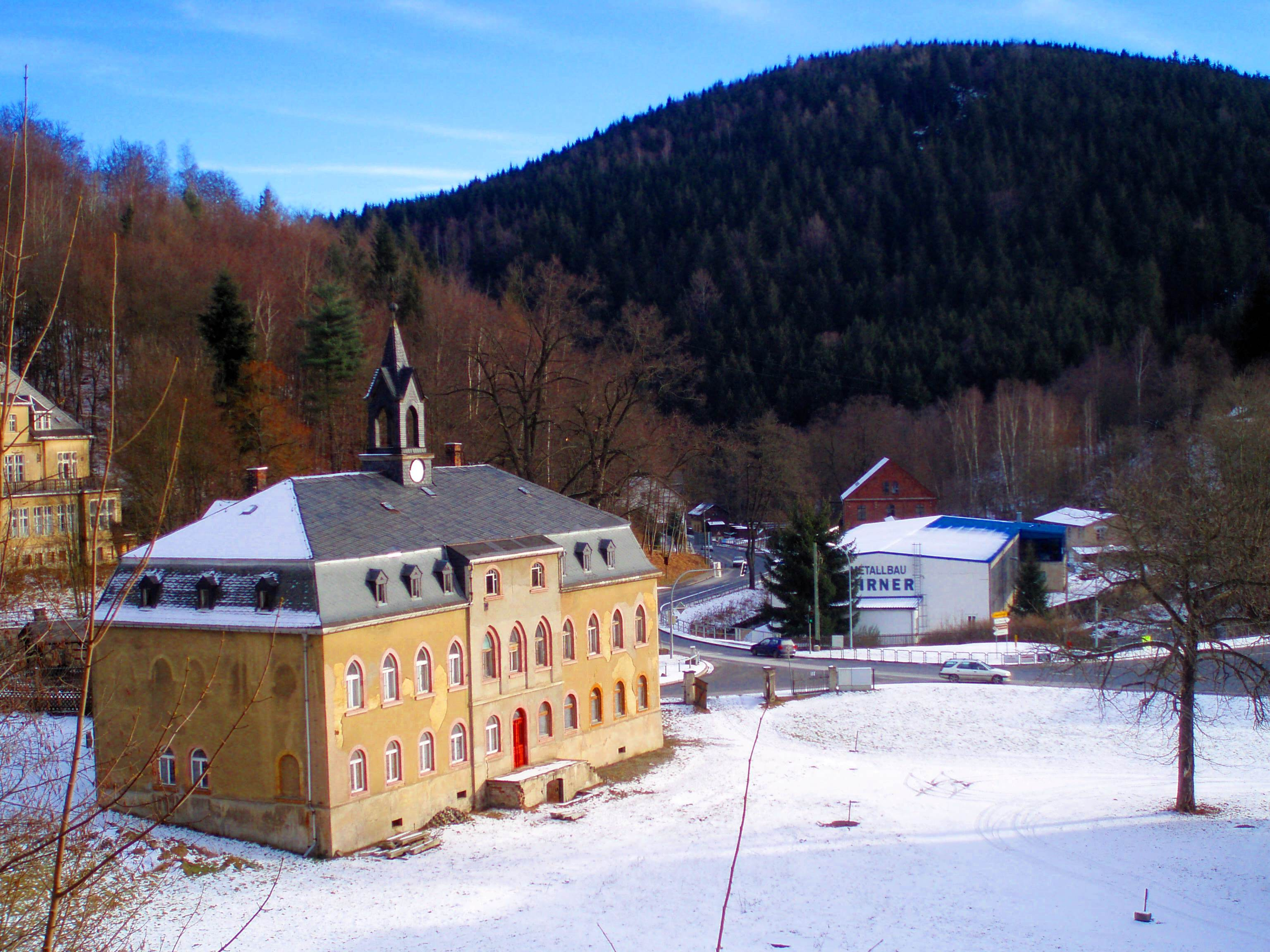 Blick auf Antonsthal, Herrenhaus Antonshütte